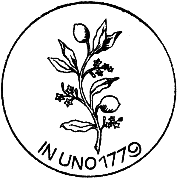 Siegel der Oberlausitzischer Gesellschaft der Wissenschaften 1779; Das Siegel der Gesellschaft konzipierte zeitnah Karl Adolph von Schachmann. Es zeigt einen blühenden Orangenzweig mit zwei Früchten sowie einer Umschrift: "Soc: Lusatiae sup:" und der Unterschrift: "in uno".